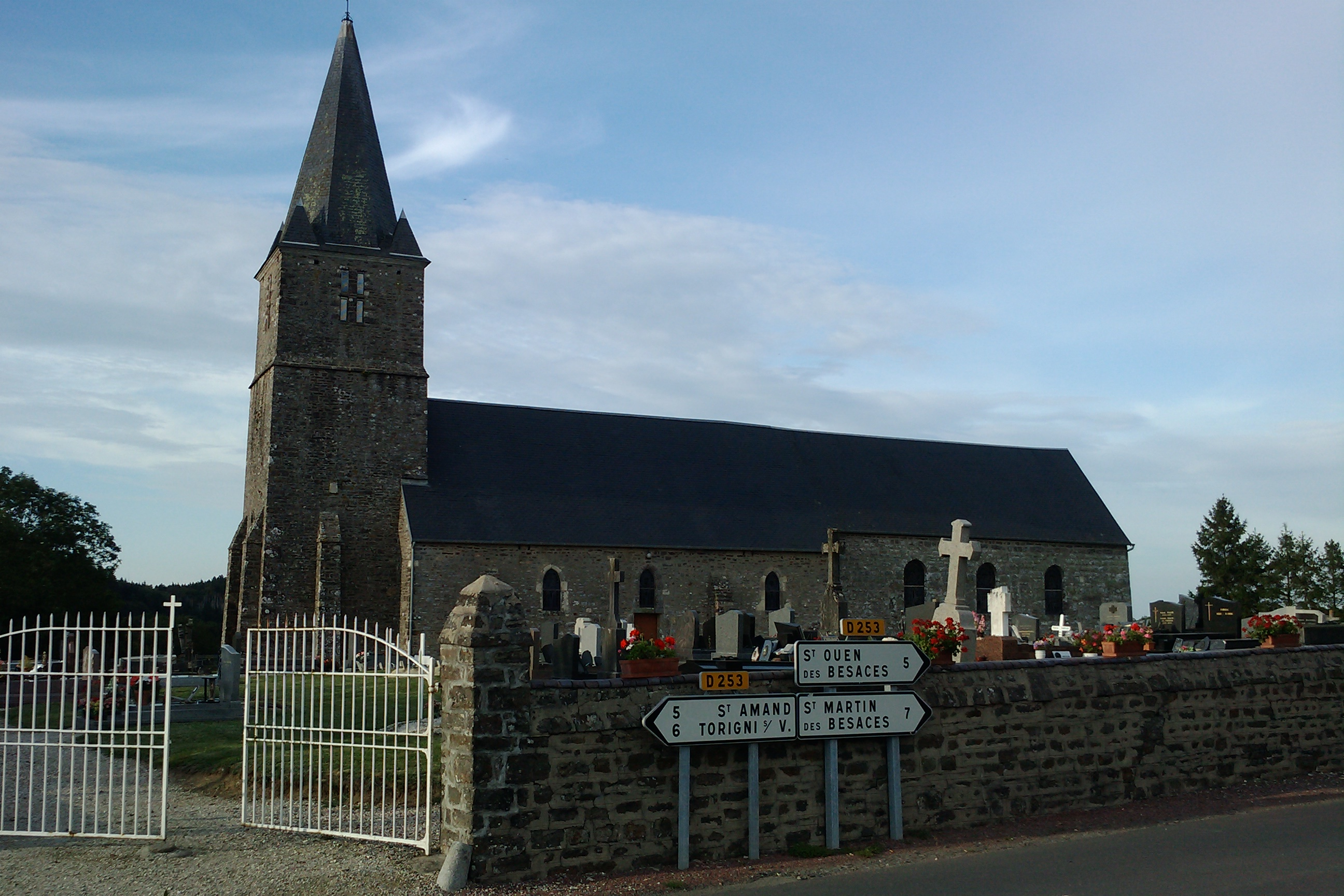 Église de